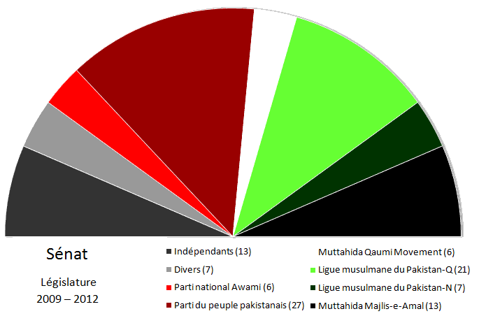 Composition du Sénat du Pakistan pour la législature 2009-2012